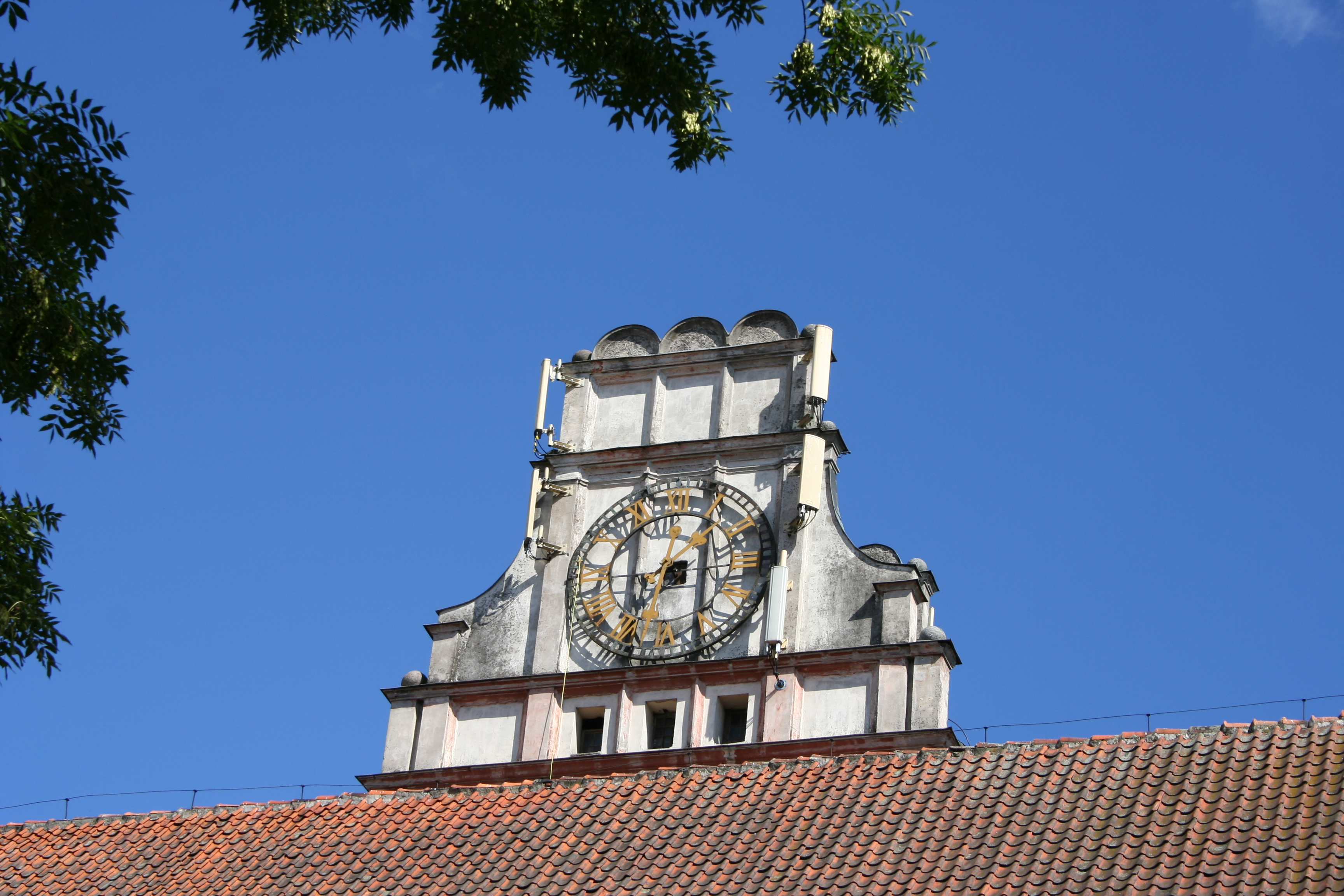 Nidzica, zespół kościoła rzym.-kat. par.p.w. św. Wojciecha i Niepokalanego Poczęcia NMP, XIV, XVII, XX